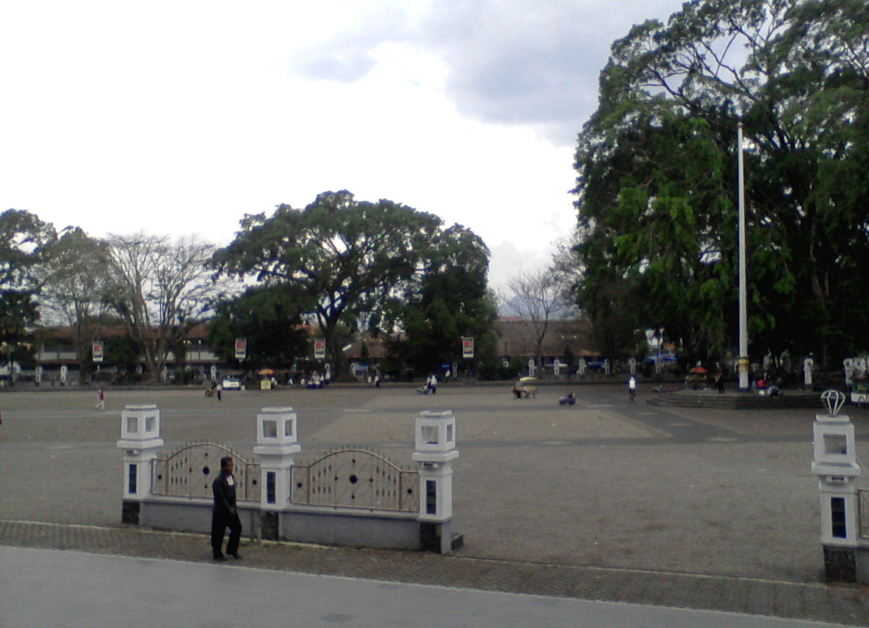 Alun-alun kabupaten Garut dilihat dari masjid agung garut